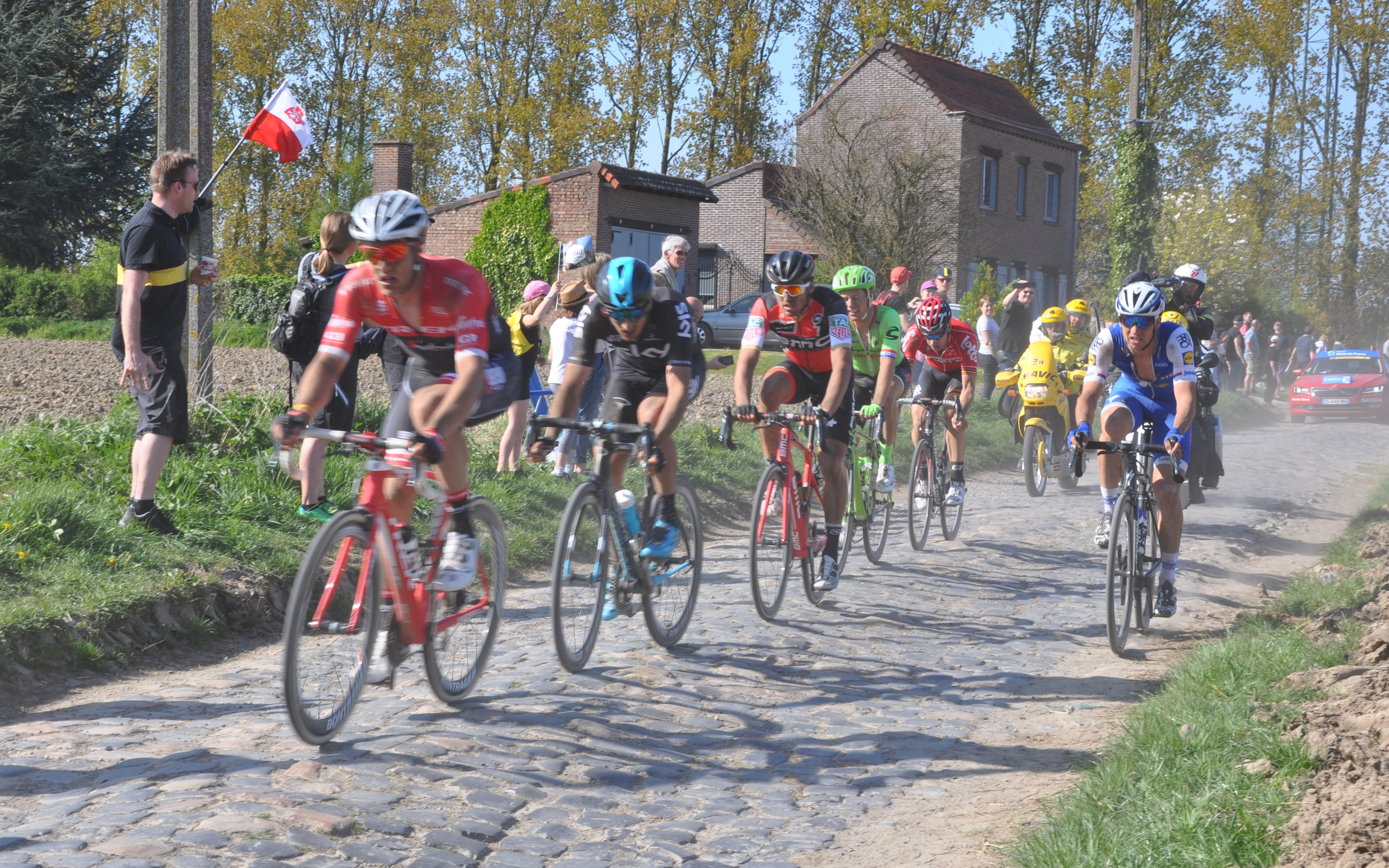 Paris-Roubaix 2017 au km 231, 6 coureurs en chasse.